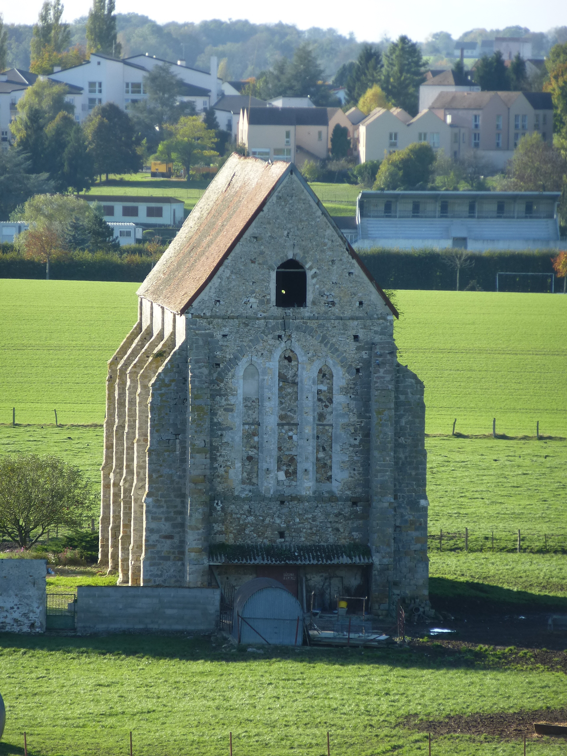 Ancienne chapelle devenue une grange, seul vestige d'une commanderie templière. (Commune de Saint-Martin-des-Champs, département de la Seine-et-Marne, région Île-de-France).